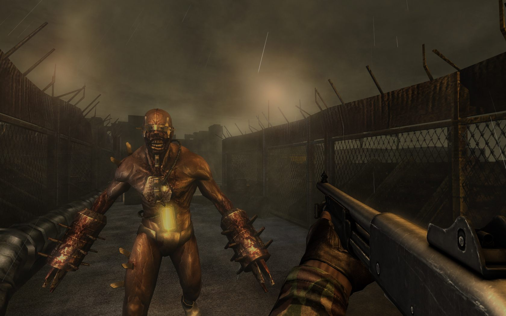 Action du jeu vidéo Killing Floor